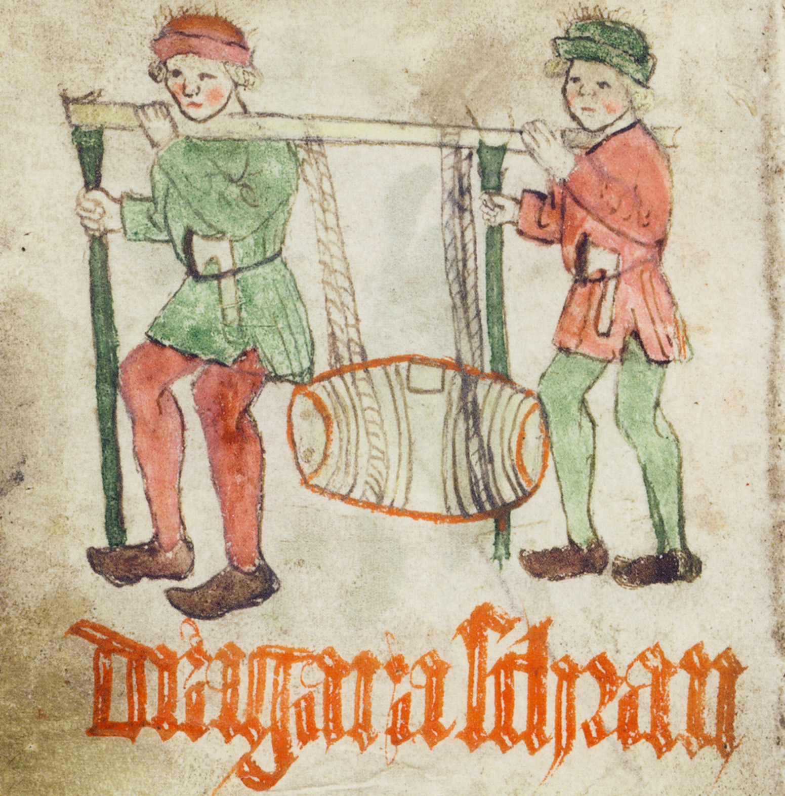 Två dragare som bär en vin- eller öltunna